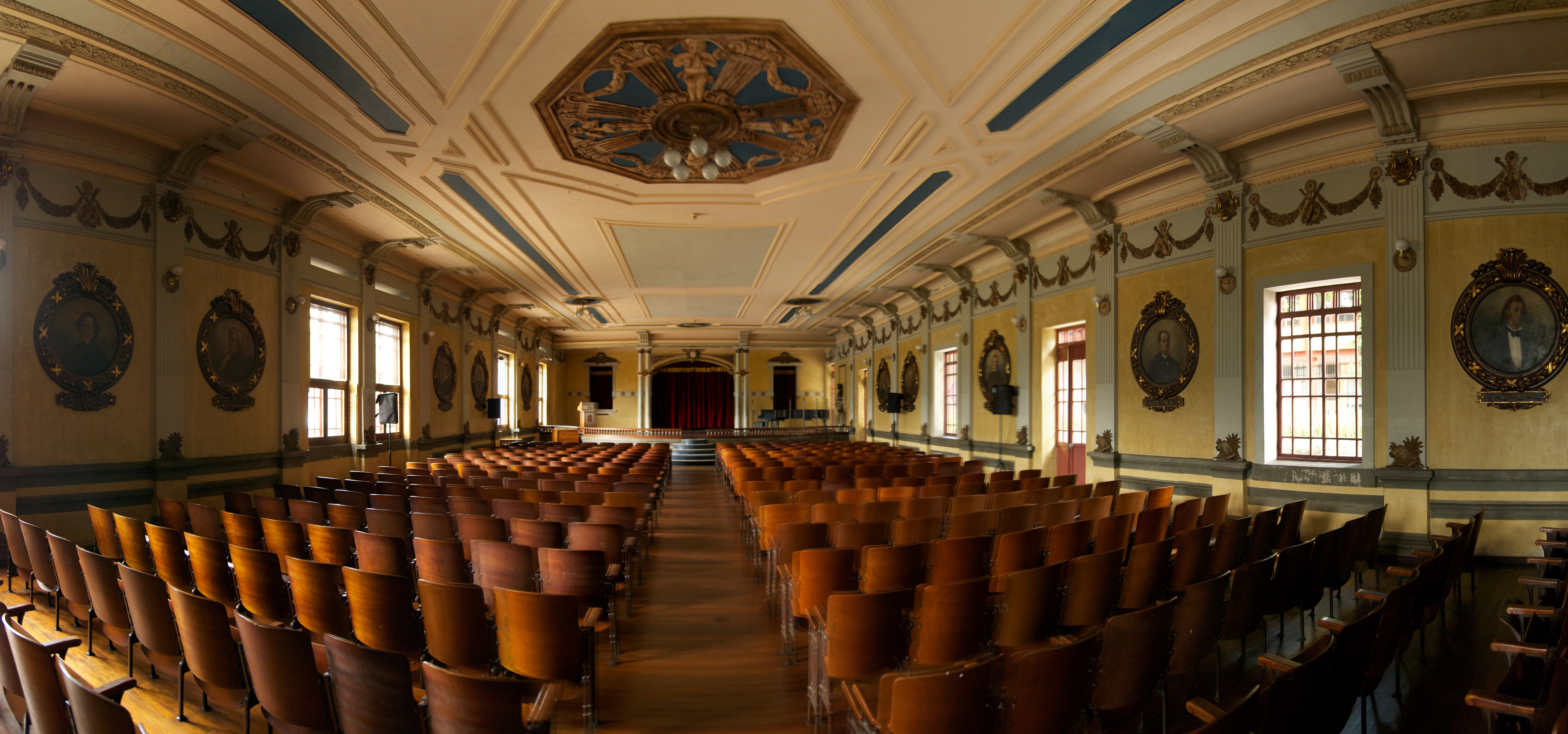 Salón Alberto Castilla y la colección de lienzos del Maestro Domingo Moreno Otero